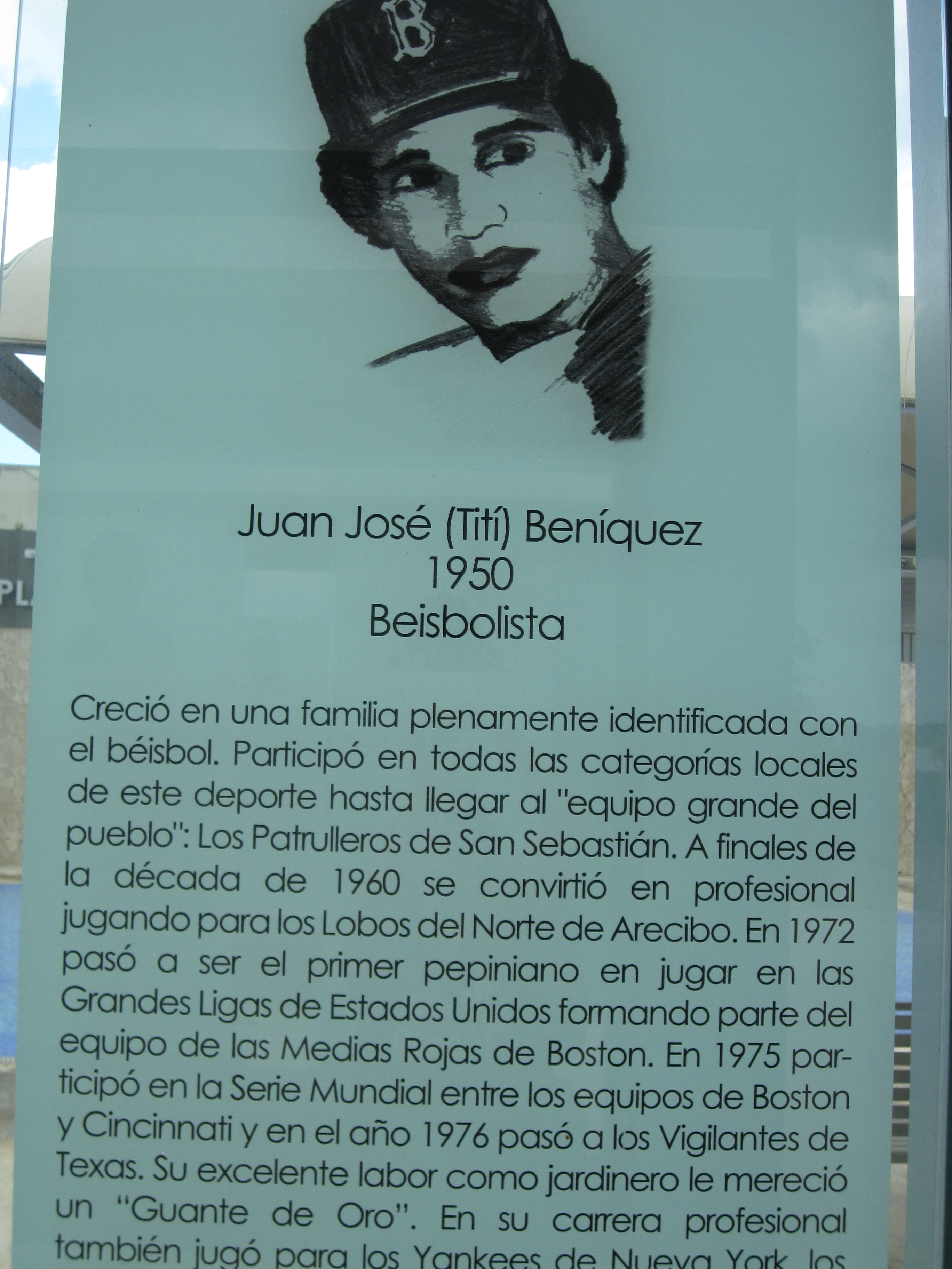 Juan José Beníquez, Puerto Rican baseball player